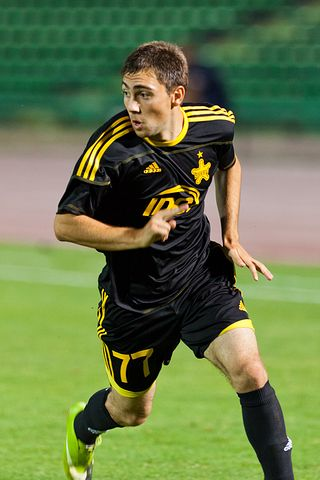 Кептине Анатолий, матч за FC Sheriff